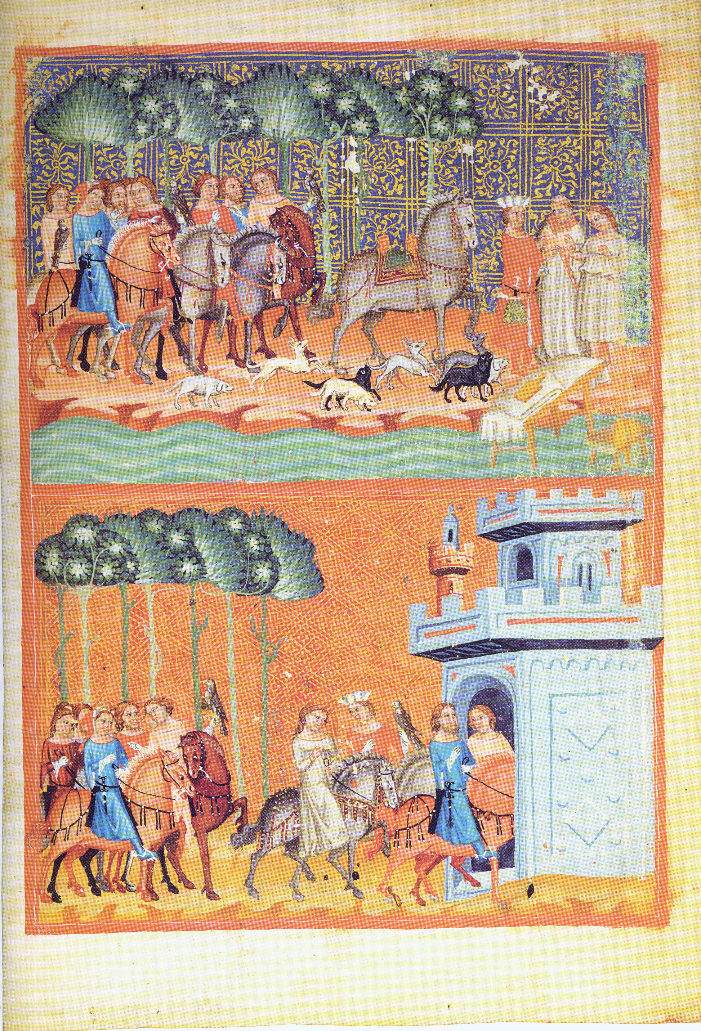 Oldřich a Božena - Dalimilova kronika, latinsky preklad, 14. stoleti - Oldřich na lovu potkává Boženu, kněz je oddává. Oldřich při návratu z lovu přivádí Boženu do svého hradu.